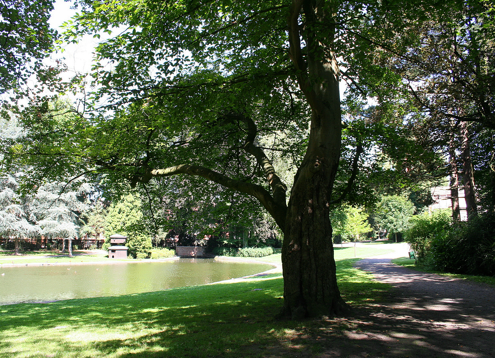 Mons, Parc du Waux-Hall - Hêtre d'Amérique. Fagus grandifolia Circonférence mesurée à 1m du sol: 318 cm - (2007)